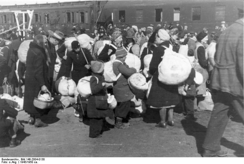 Ankunft von Flüchtlingen aus Ostpr. in Schleswig-Holstein (Bahnhof Meldorf).